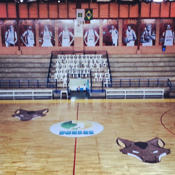 Quadra do Ginásio ASCEB, em Brasília.